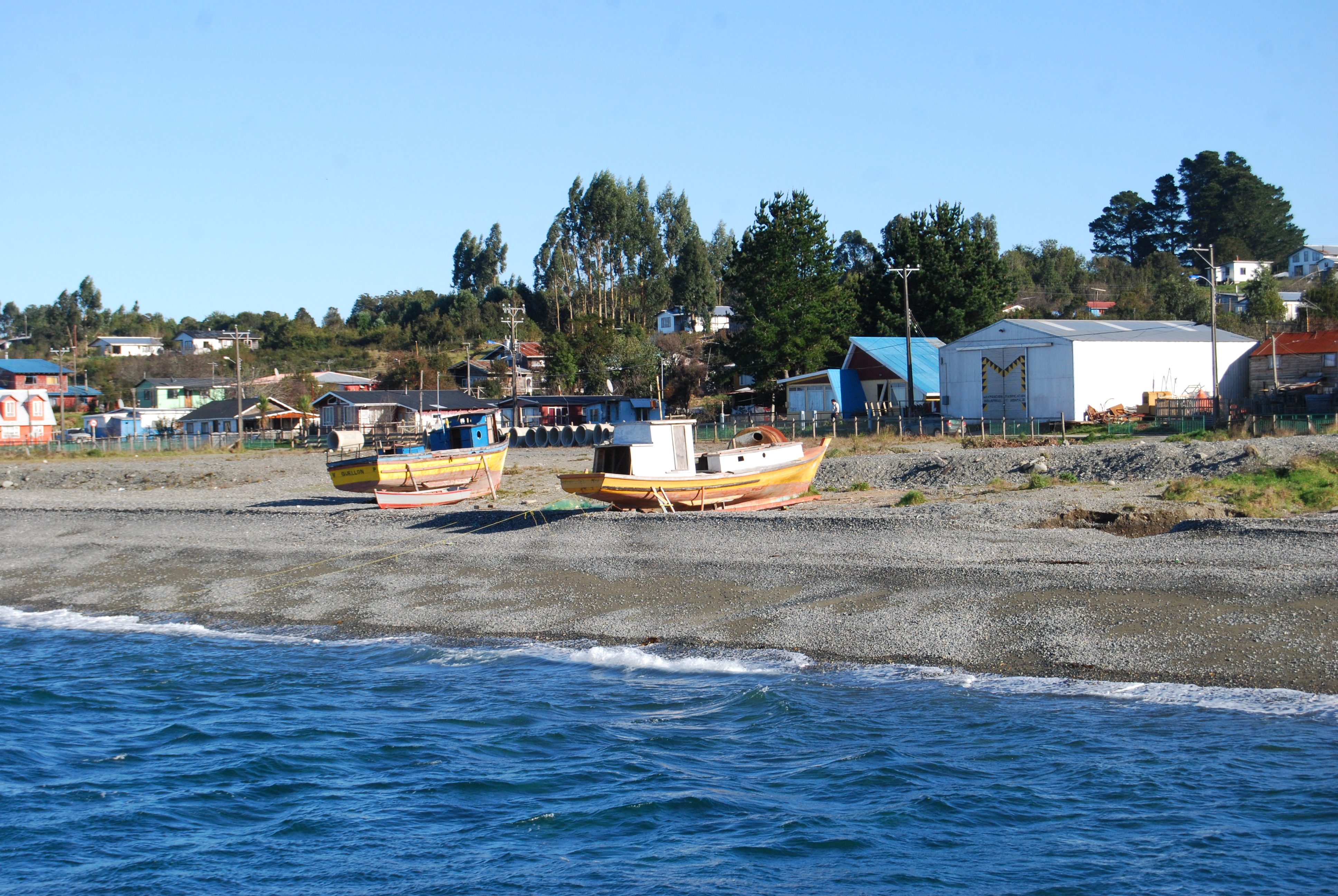 Vista de Pargua, en el canal de Chacao.